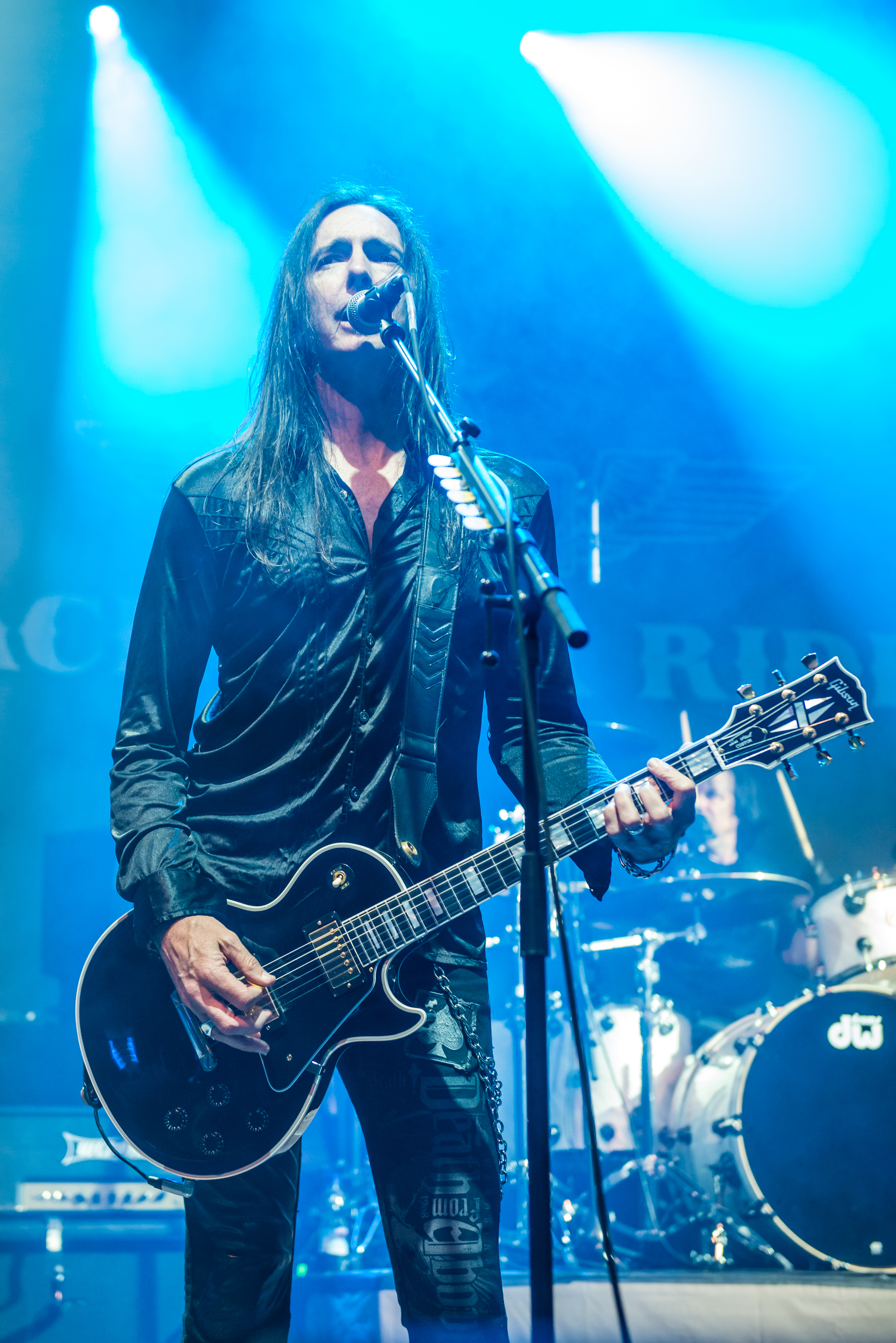 'Rock Hard Festival 2015; Gelsenkirchen Amphitheater': 'Black Star Riders'